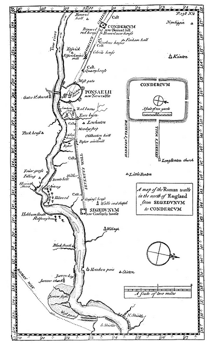 L'estremità orientale del Vallo di Adriano secondo John Horsley (m.1732) - Britannia Romana, 1684